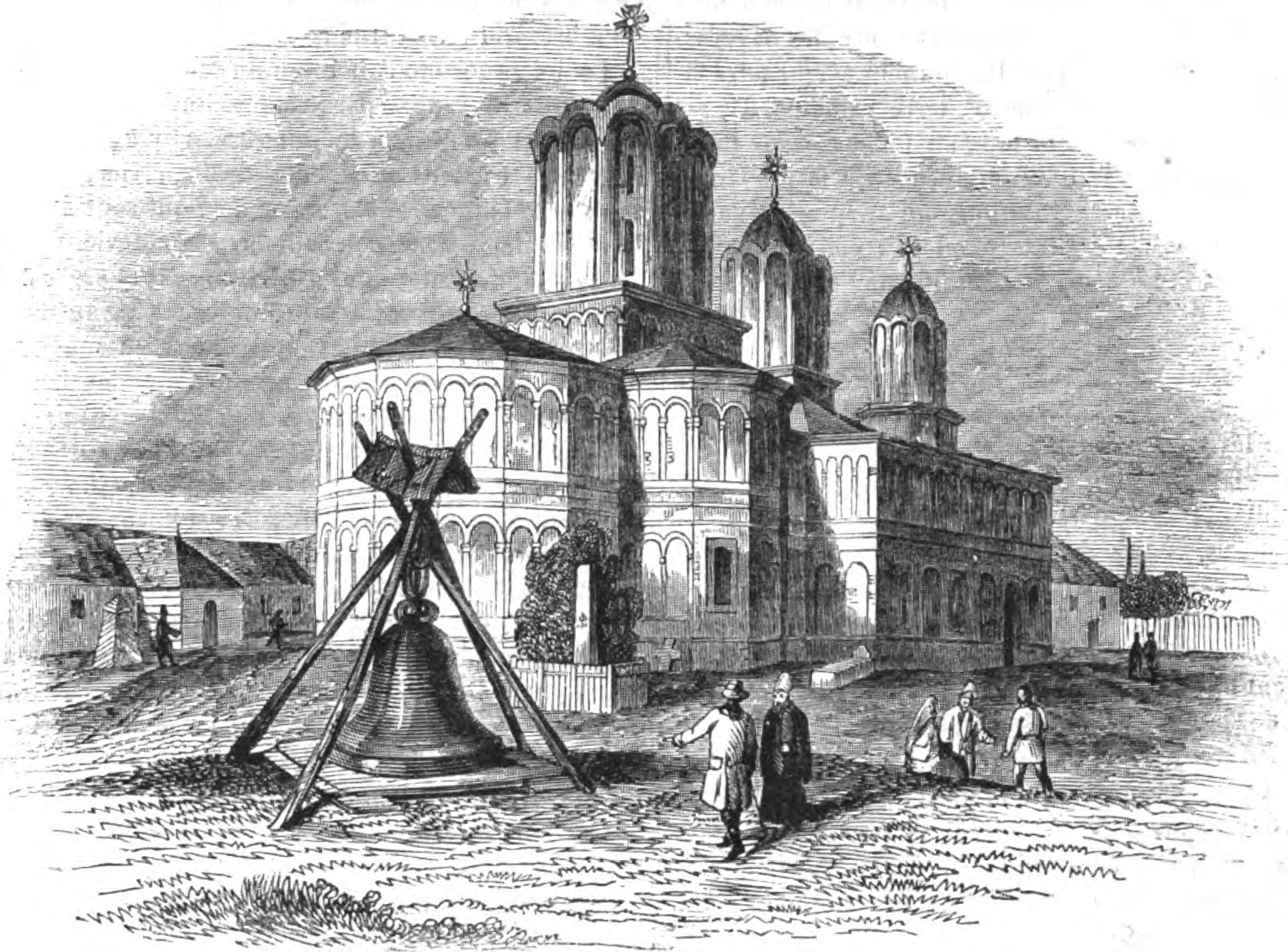 Mitropolia (Biserica Patriarhiei), Dealul Mitropoliei, Bucharest